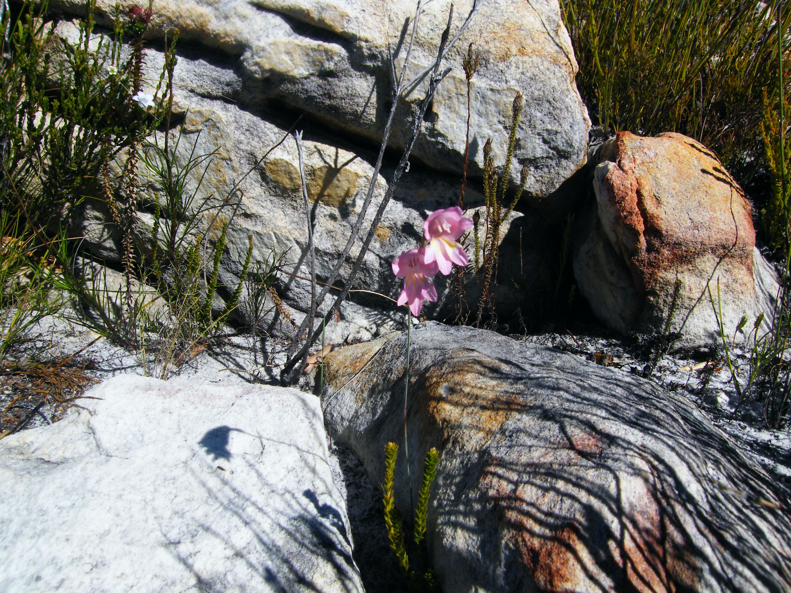 Herfspypie